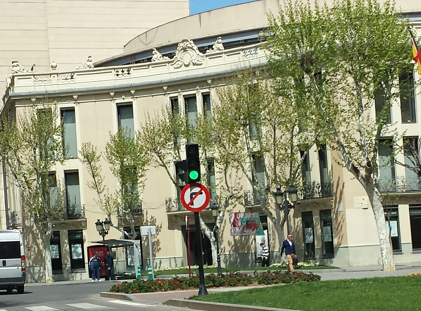 Edificio CCM